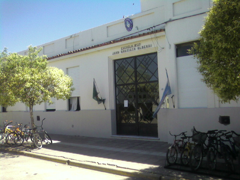 Escuela Primaria en Moquehuá, partido de Chivilcoy, provincia de Buenos Aires, Argentina.